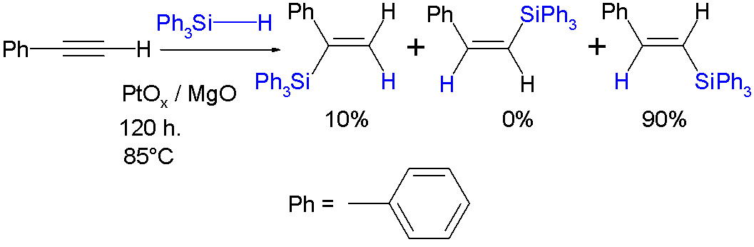 Hydrosilylation triphenylsilylhydride